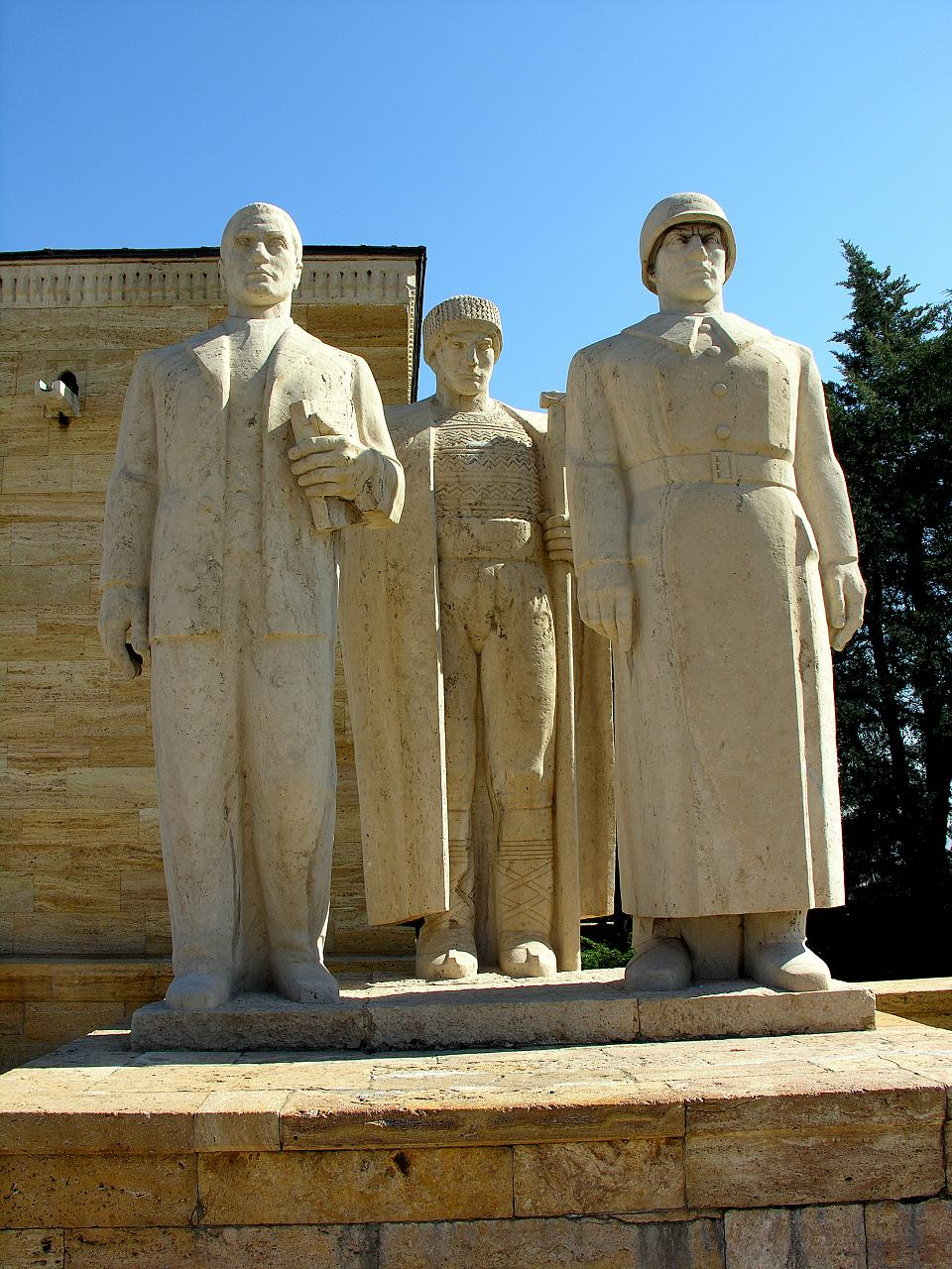 Turkey-1638